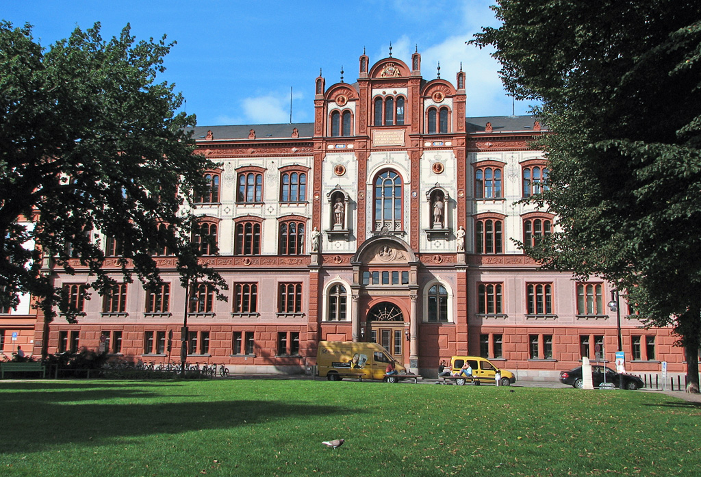 Beschreibung: Hauptgebäude der Universität in Rostock / Frontseite / Germany Fotograf: Darkone, 17. August 2005